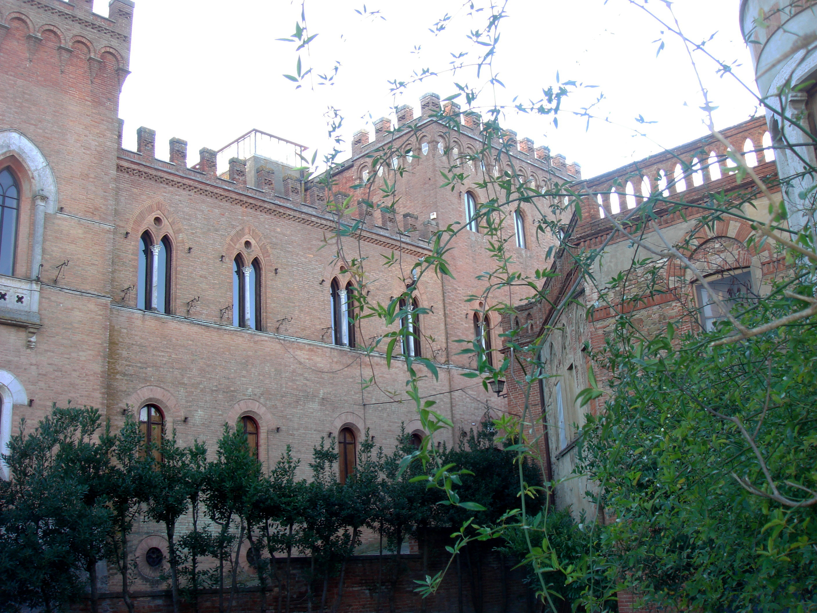 Esterno laterale Castello di Farnetella (Siena)